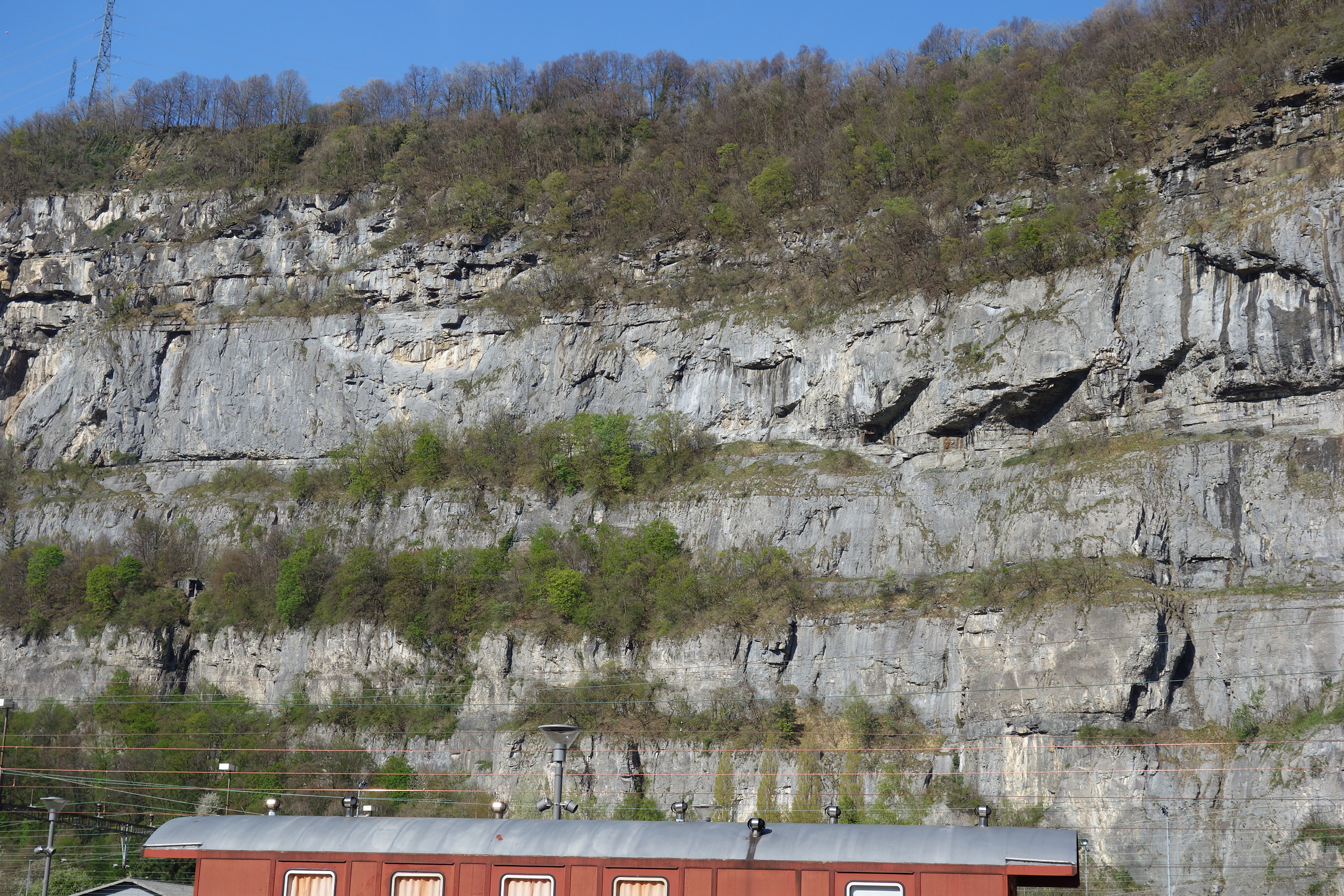 Fort du Scex, Saint-Maurice VS, Schweiz